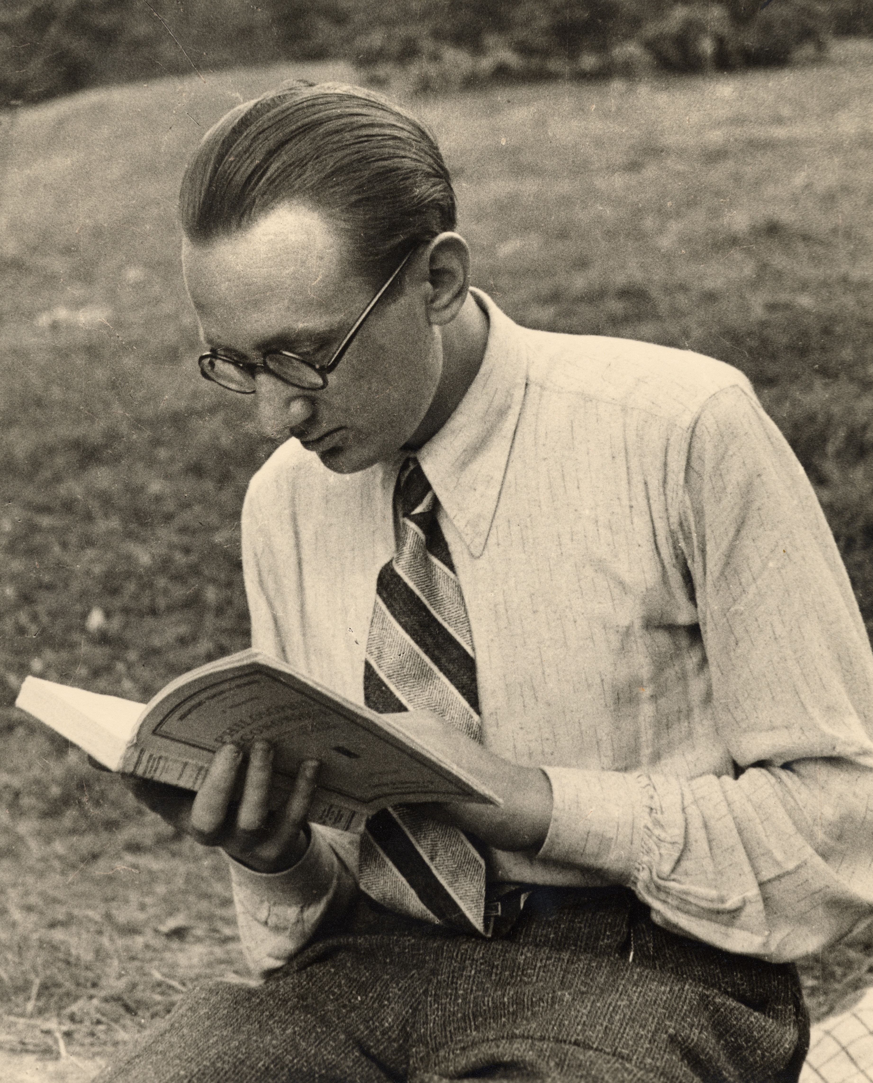 Sergio Paronetto (1911-1945)